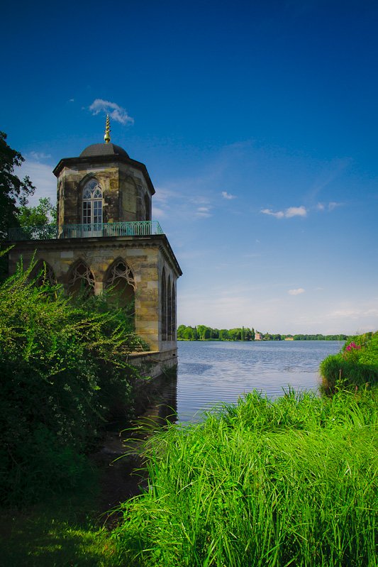 Gotische Bibliothek